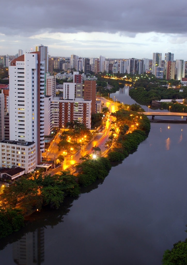 Cidade de RecifeA Cidade e o Rio